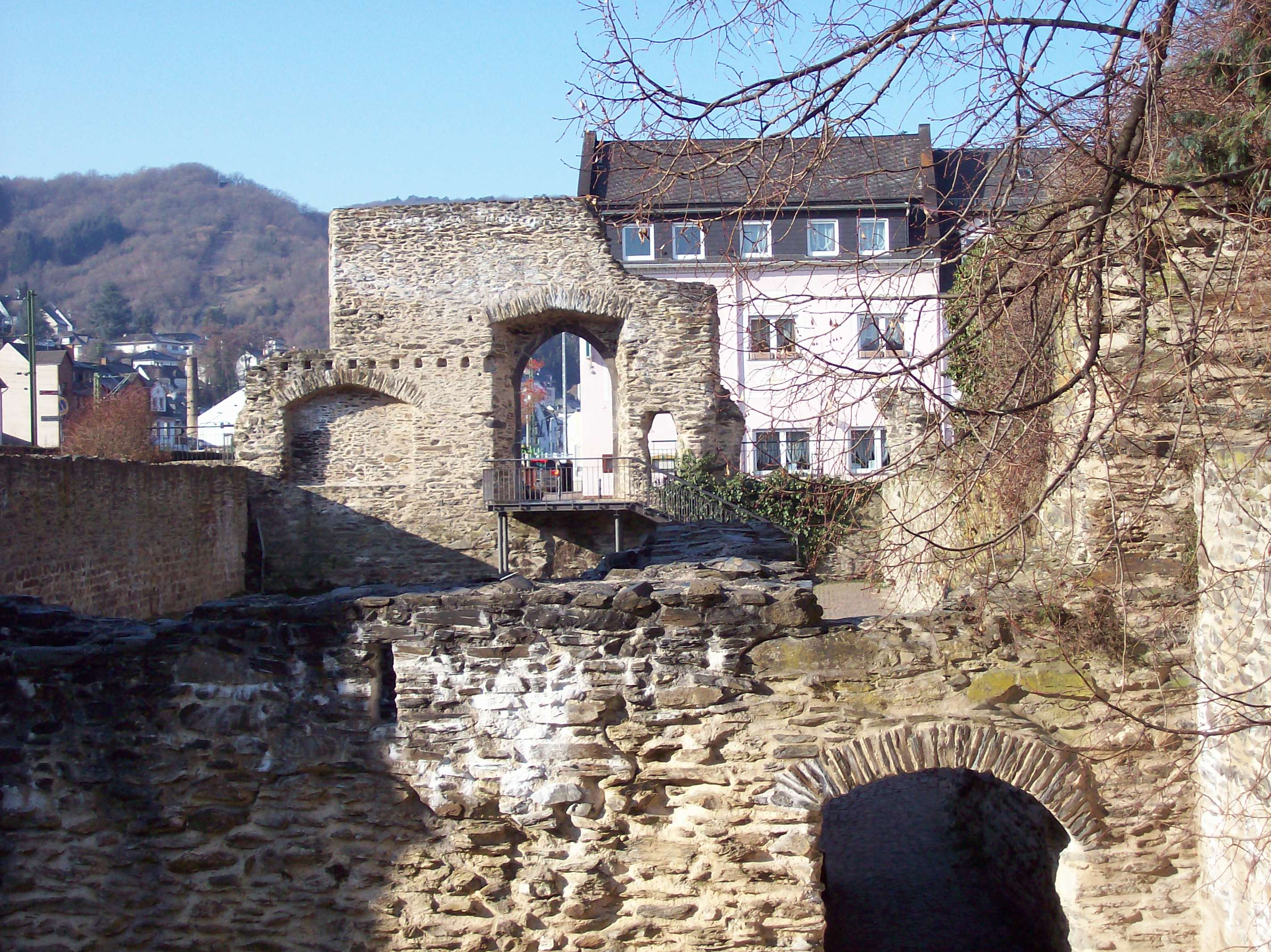 Die Ruine des mittelalterlichen Tanzhauses von Boppard